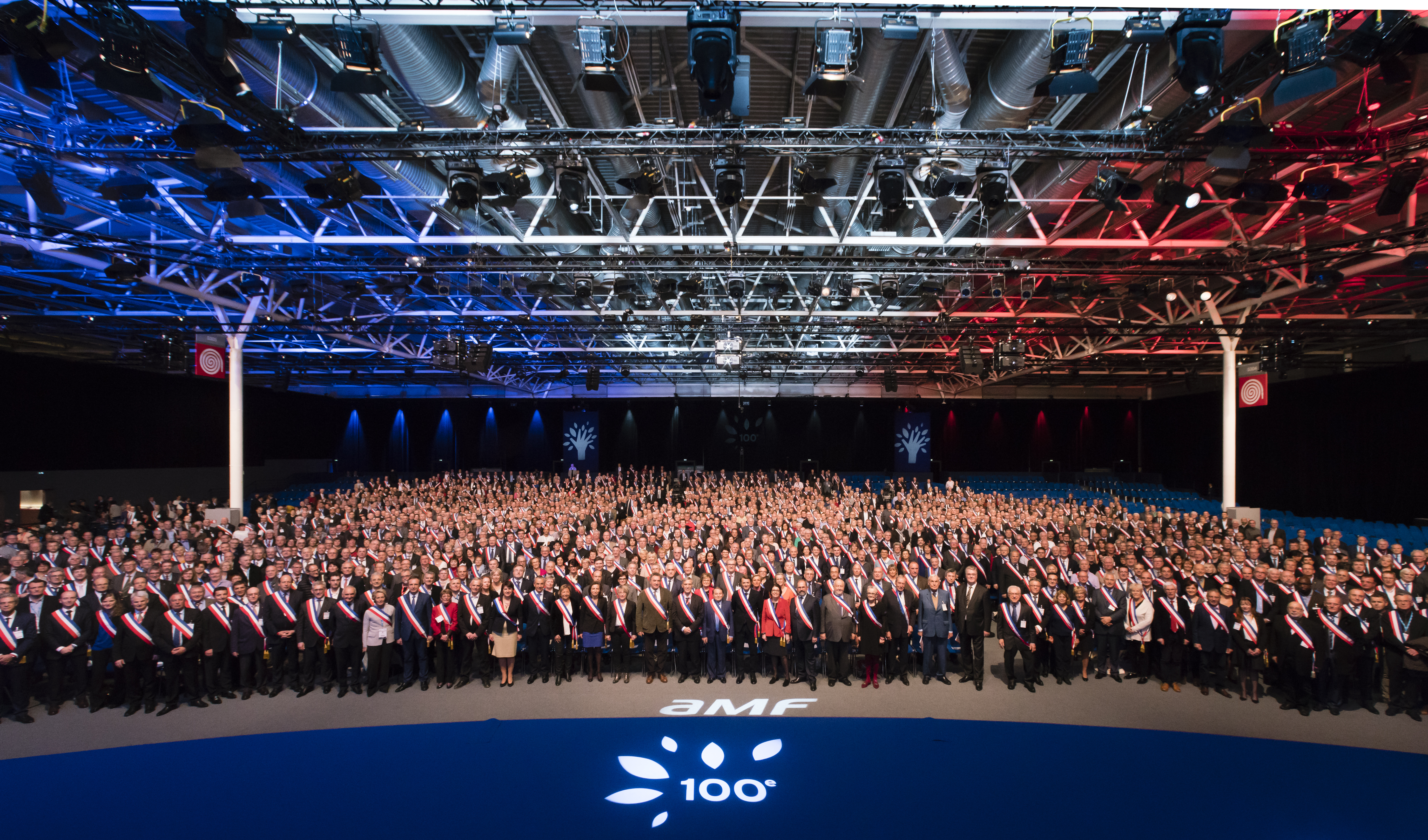 100e Congrès de l'AMF (novembre 2019)